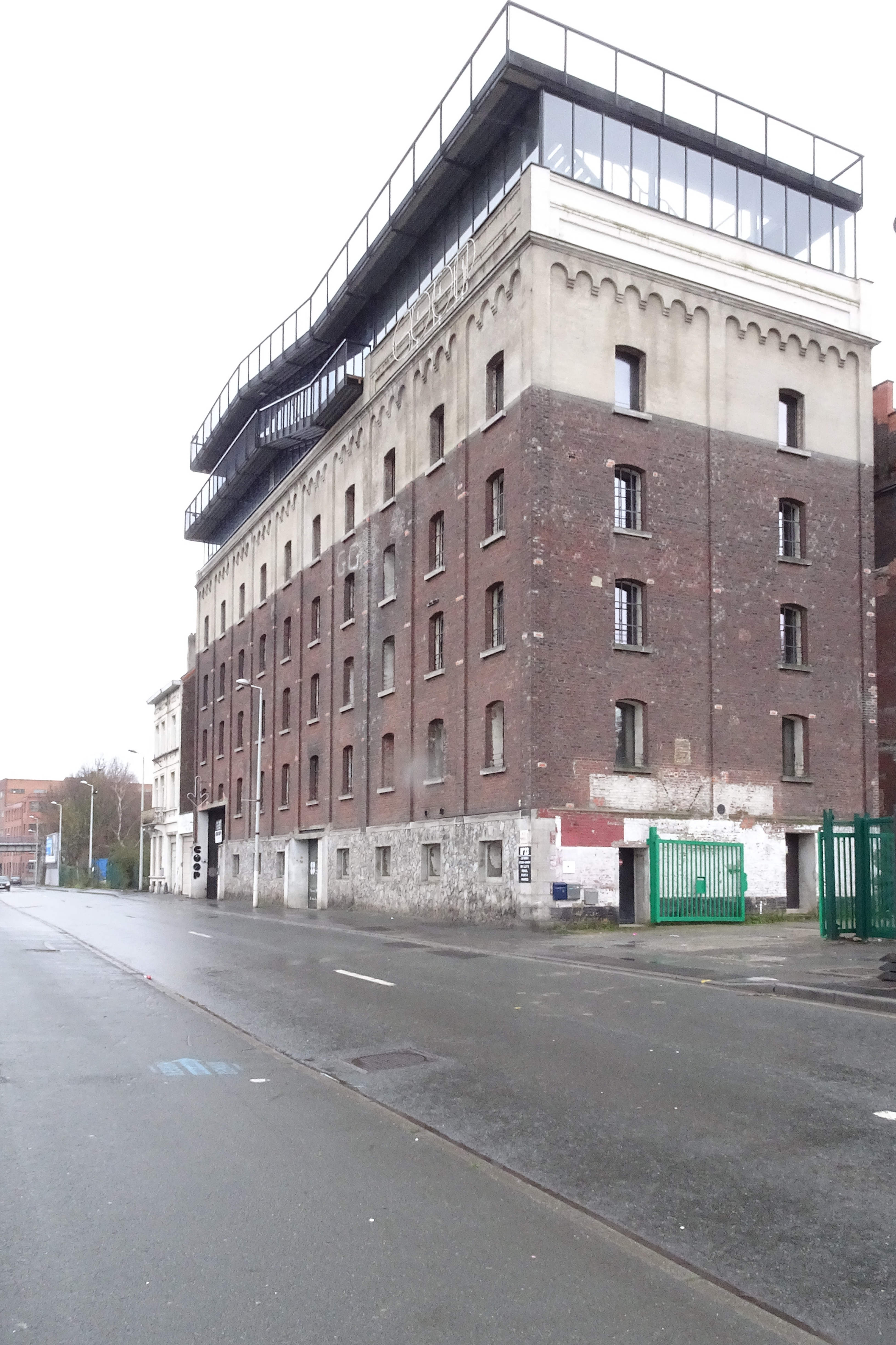 Siège de la société COOP